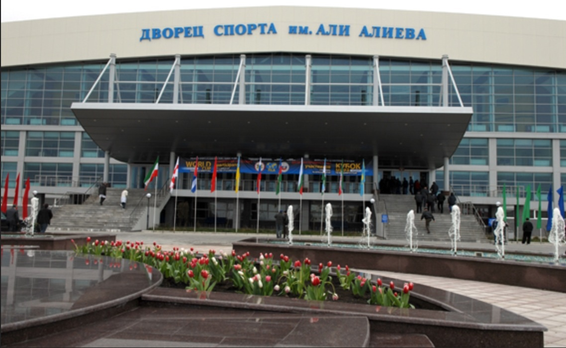 Спортивно-оздороивтельный комплекс г. Каспийск, Карабудахкентский район This image is related to the protected area of Russia number 0520018